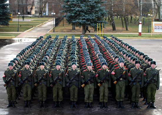 Московское высшее военное командное училище. Построение курсантов на плацу